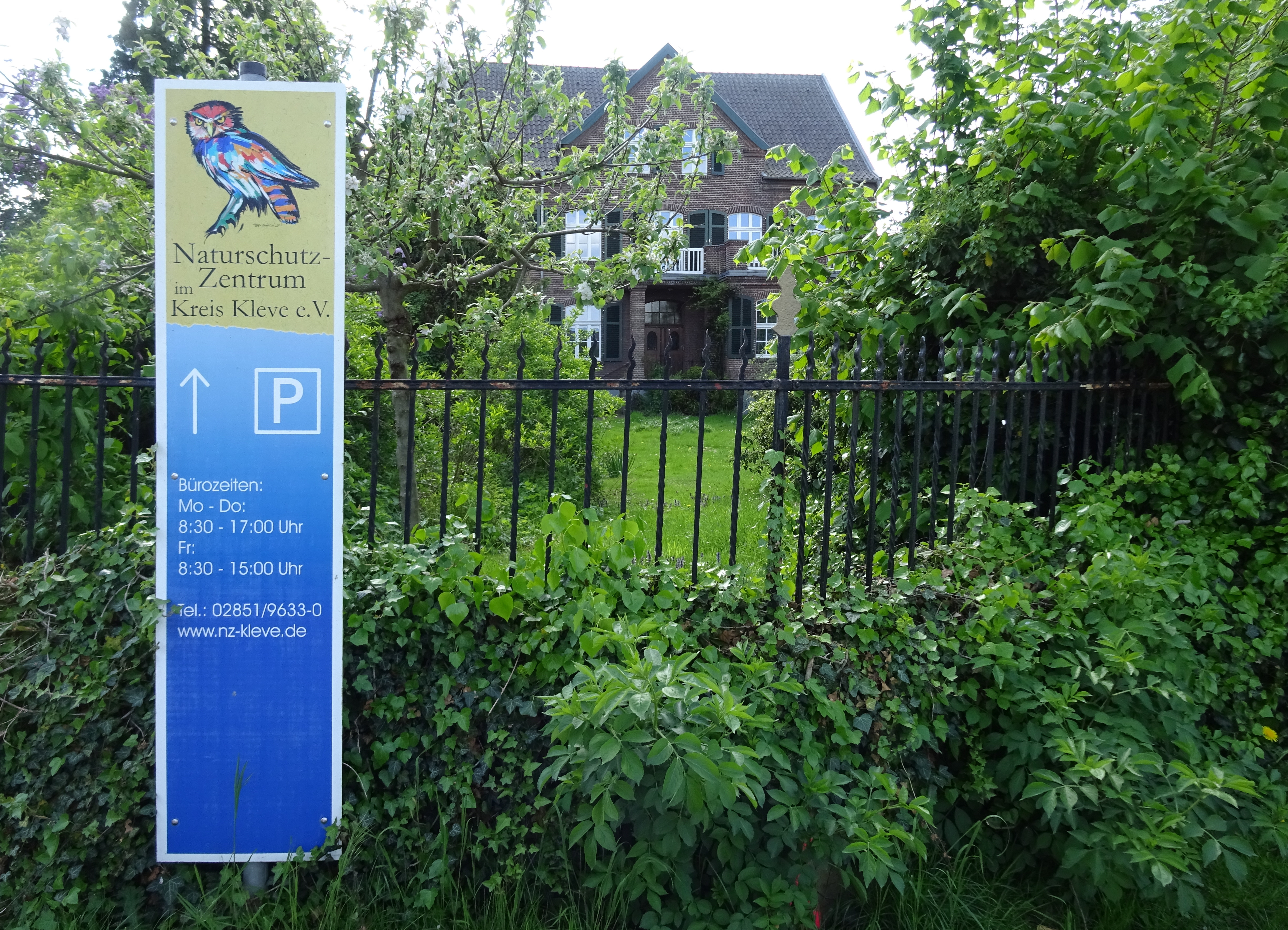 Rees-Bienen, Niederstraße 3, Naturschutzzentrum im Kreis Kleve e.V